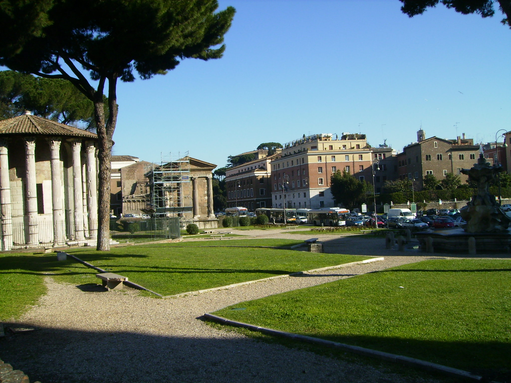 Vue générale du Forum Boarium: Le temple d'Hercule Vainqueur, le Temple de Portunus et la fontaine.